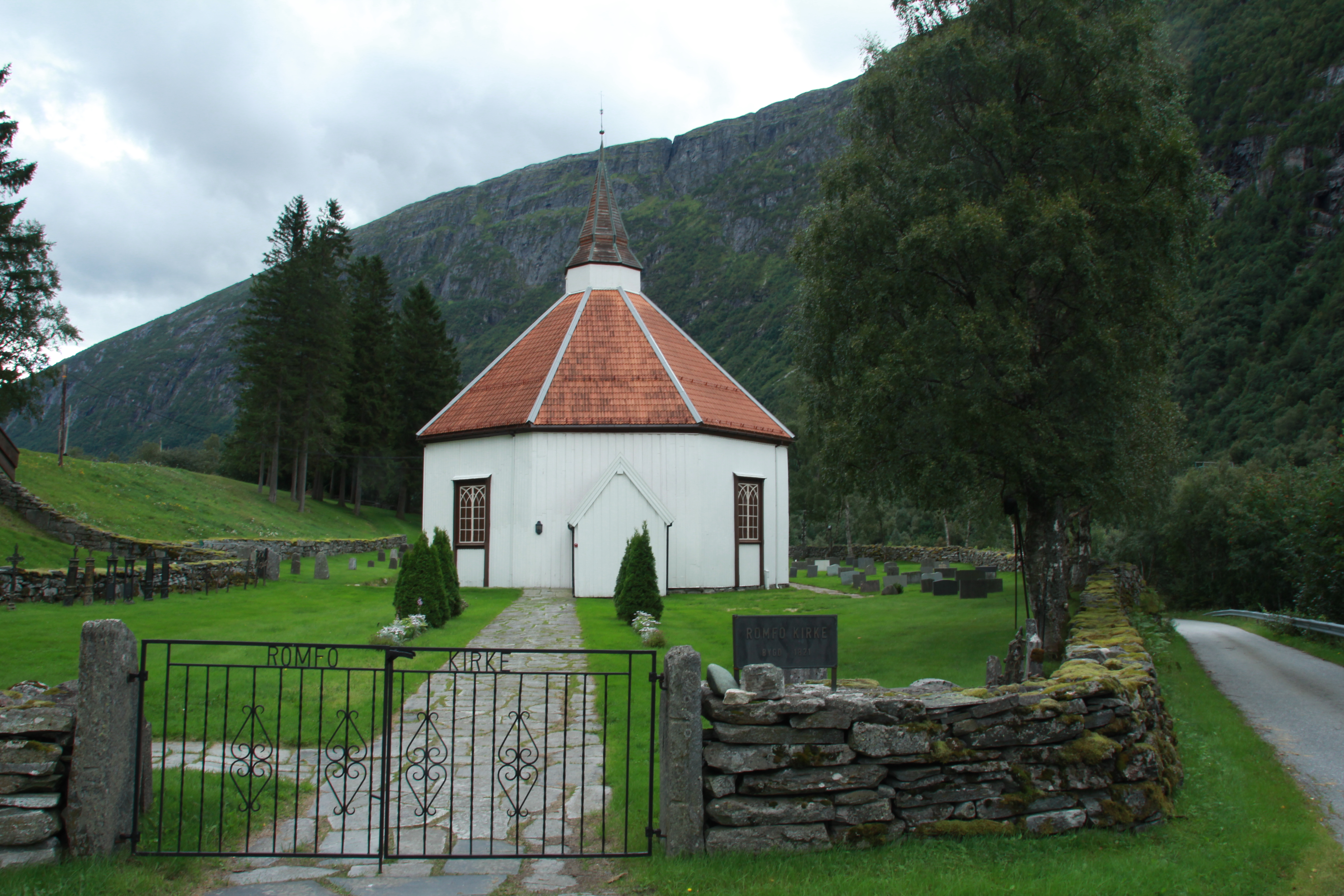 Romfo kirke er en åttekantet kirke fra 1821 i Sunndal kommune, Møre og Romsdal fylke.